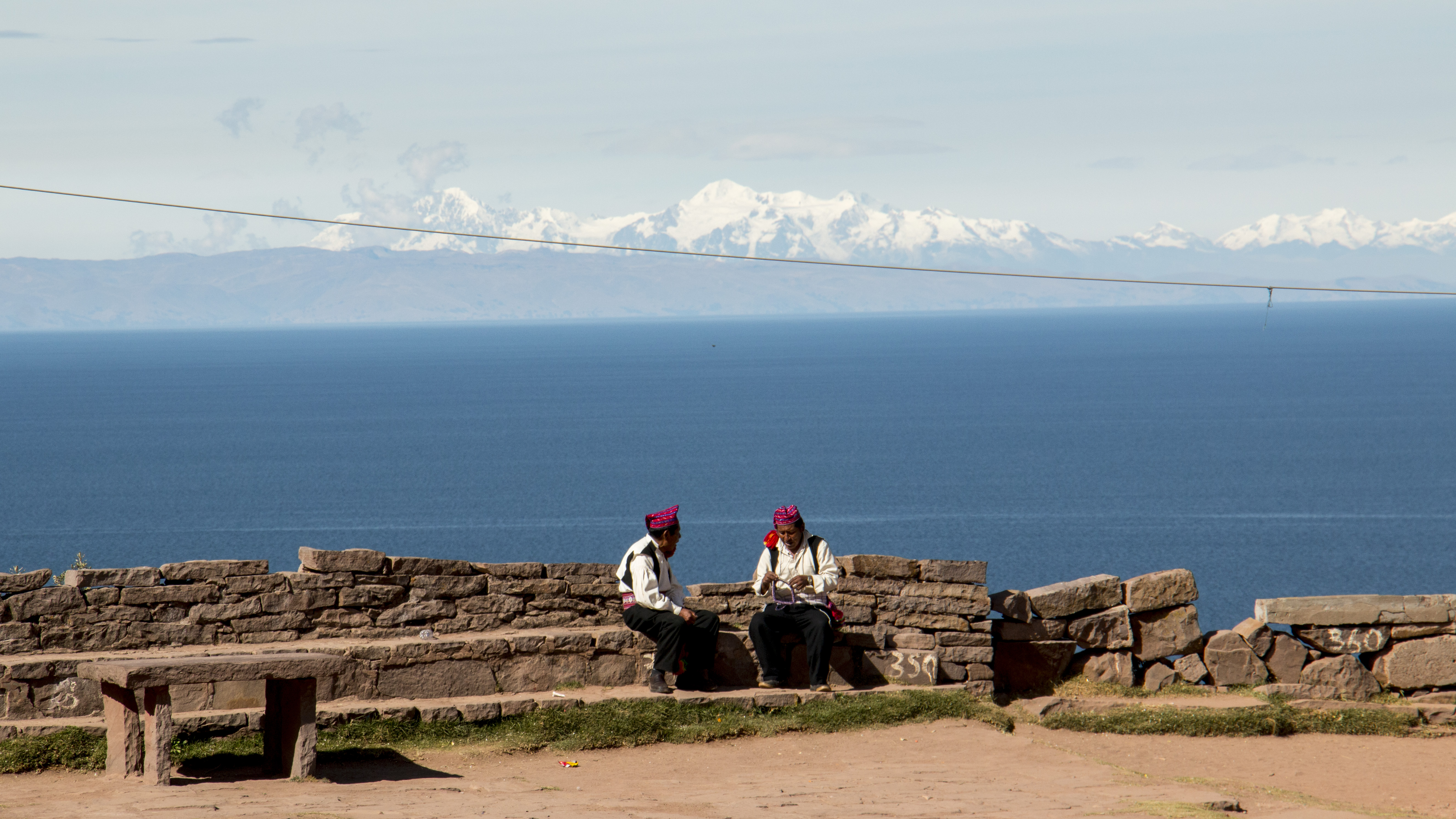 Las pintorescas imágenes de la isla, así como su historia y cultura, han convertido a Taquile en una atracción turística.